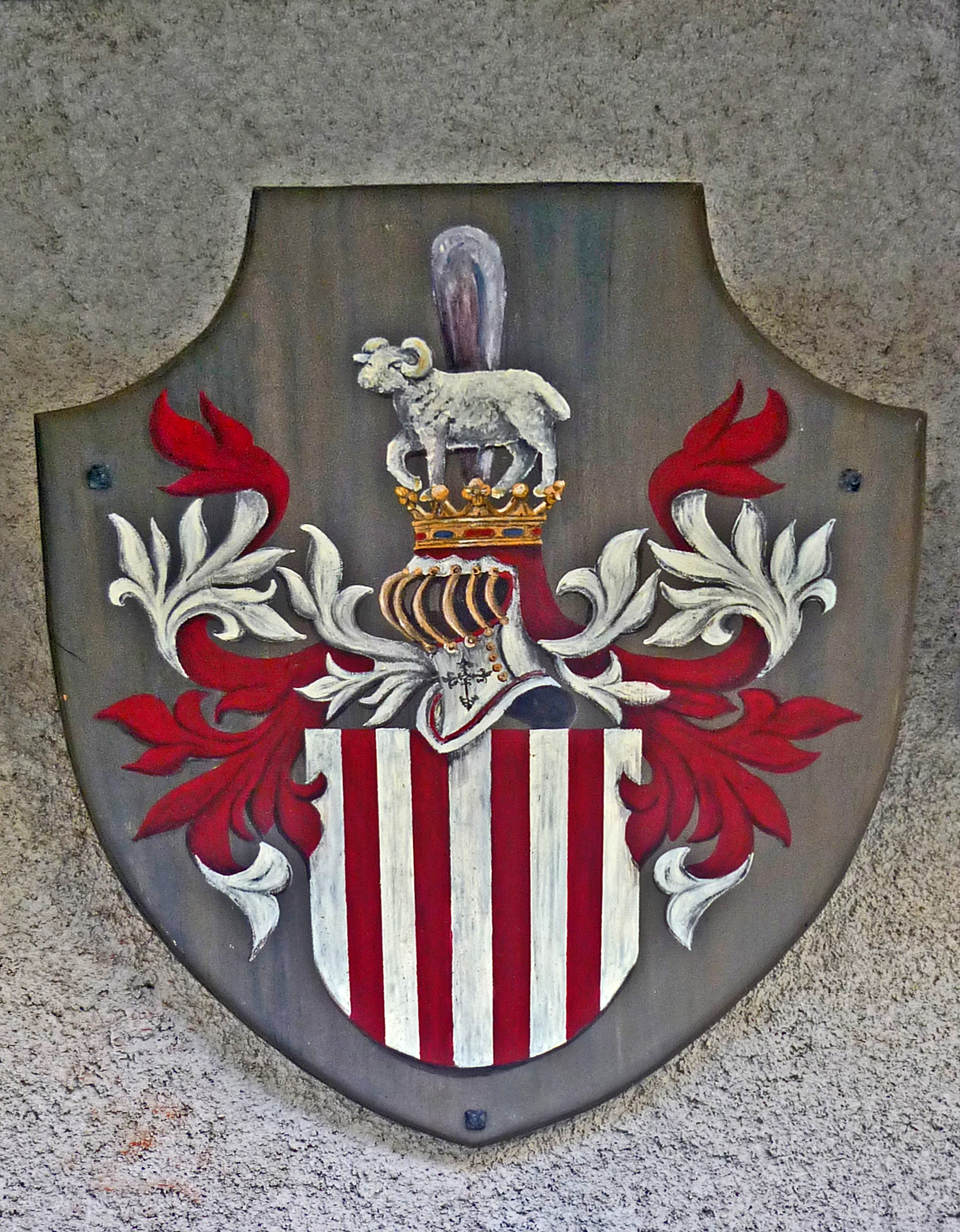 Schaffgotsch–Wappen im Innenhof von Schloss Fischbach (Karpniki) im Riesengebirge. Die Schaffgotsch waren von 1476 bis 1580 und von 1725 bis 1774 die Besitzer von Schloss und Gut Fischbach.